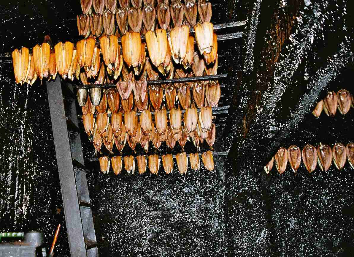 Fra kippers-røkeriet i Whitby. Foto: AEK.